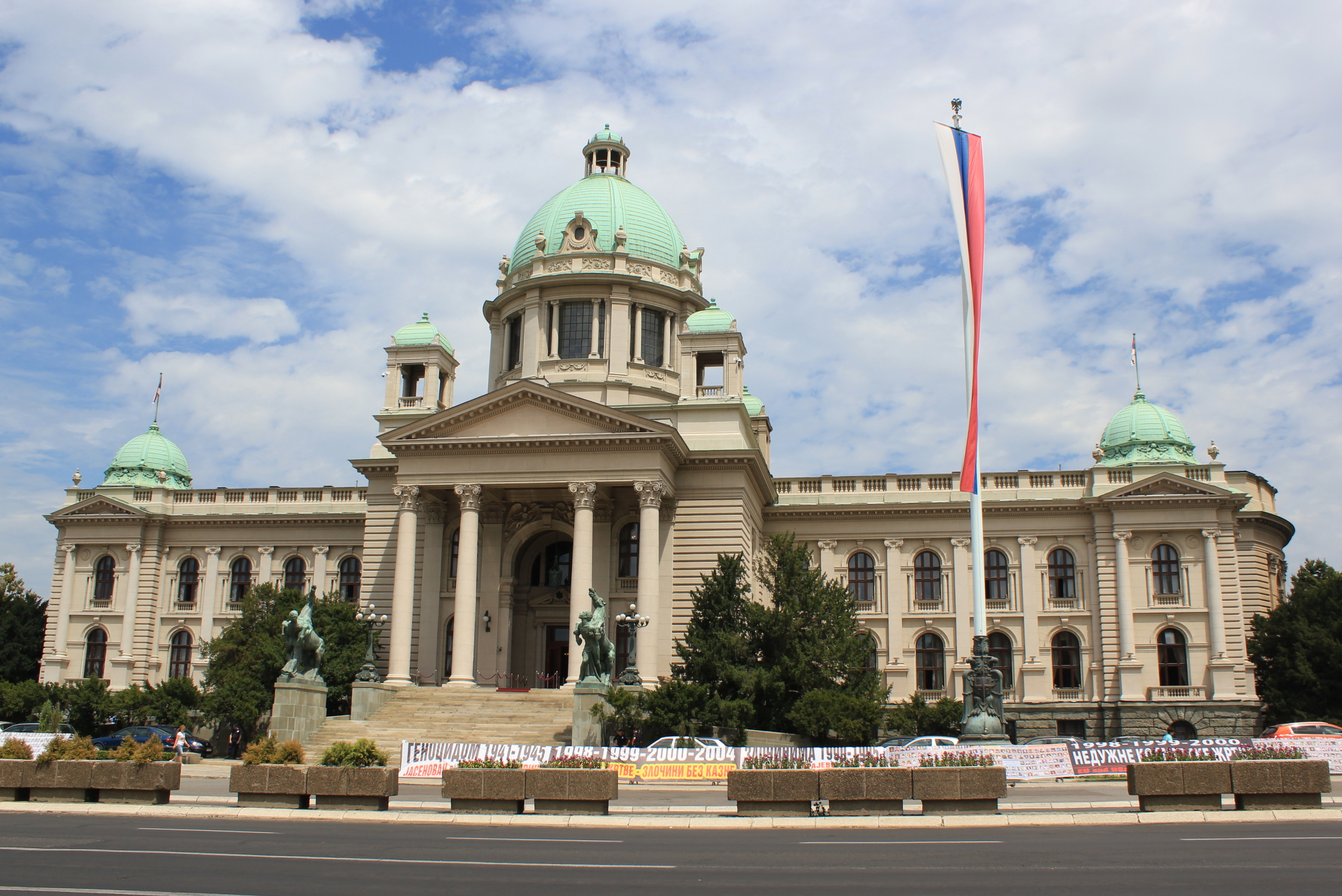 Hornjoserbsce: Parlament republiki Serbiskeje w Běłohrodźe.